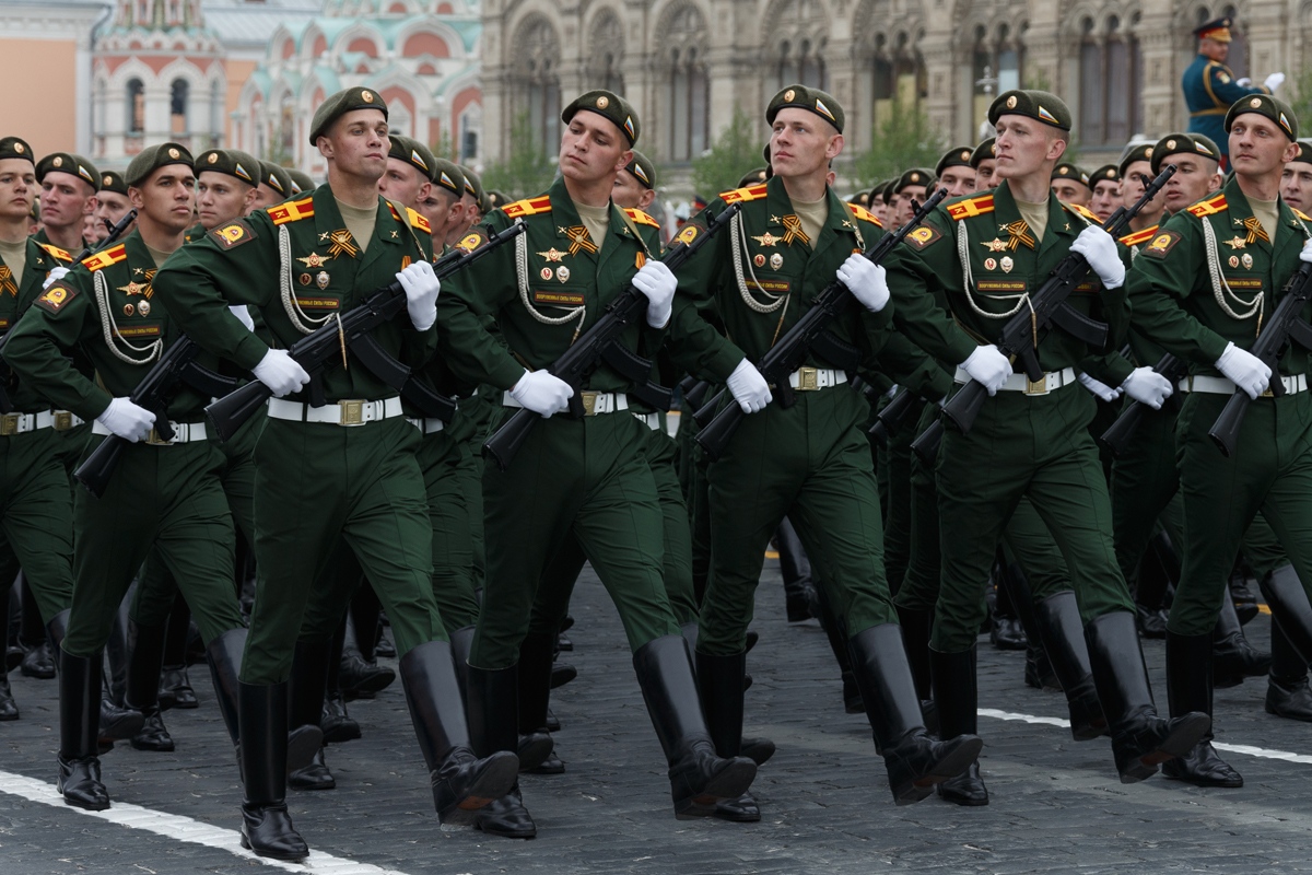 В Москве прошел парад в честь 74-й годовщины Победы в Великой Отечественной войне